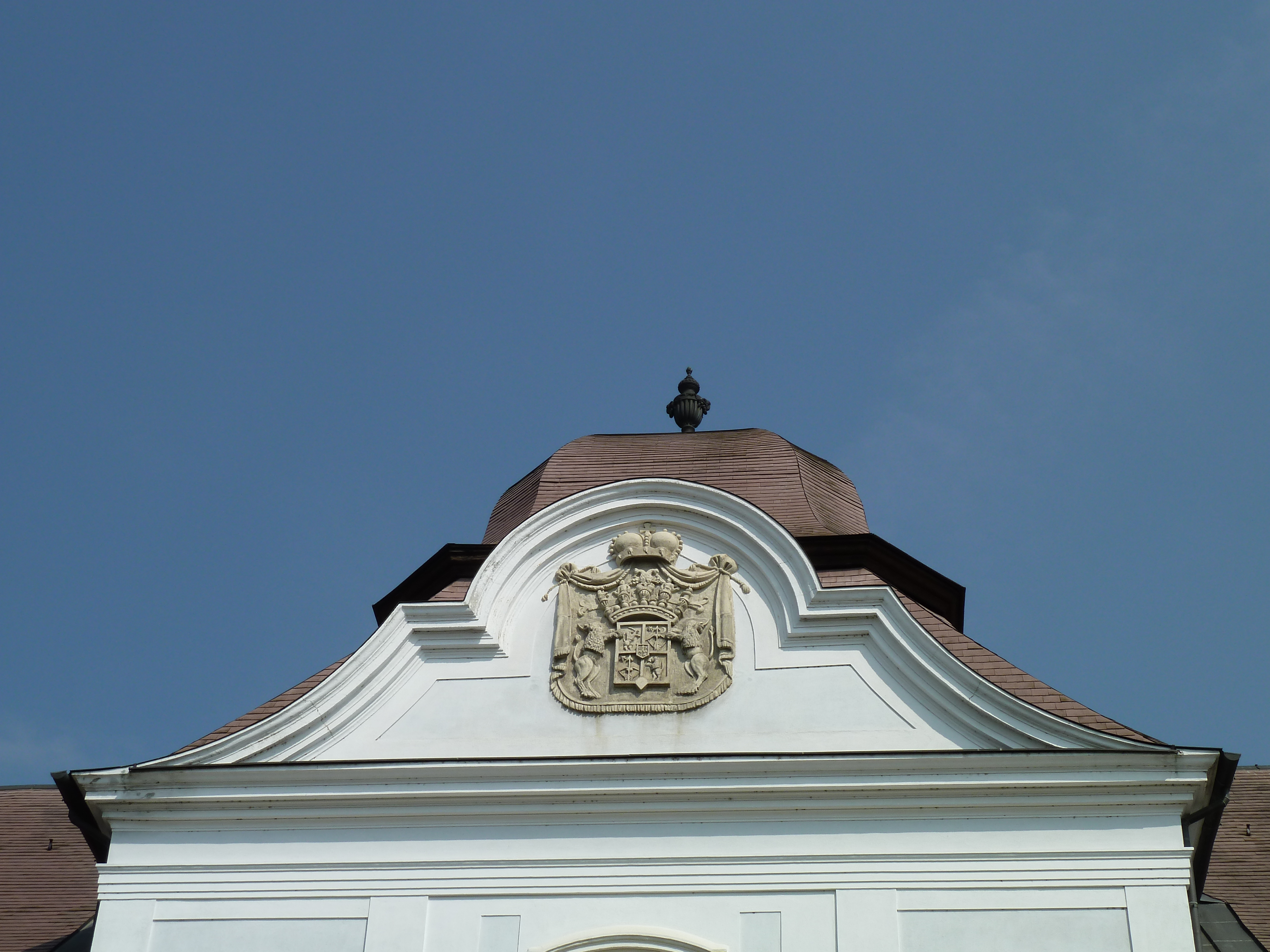 A Grassalkovich család címere a családi kastély bejárata fölött, Hatvan